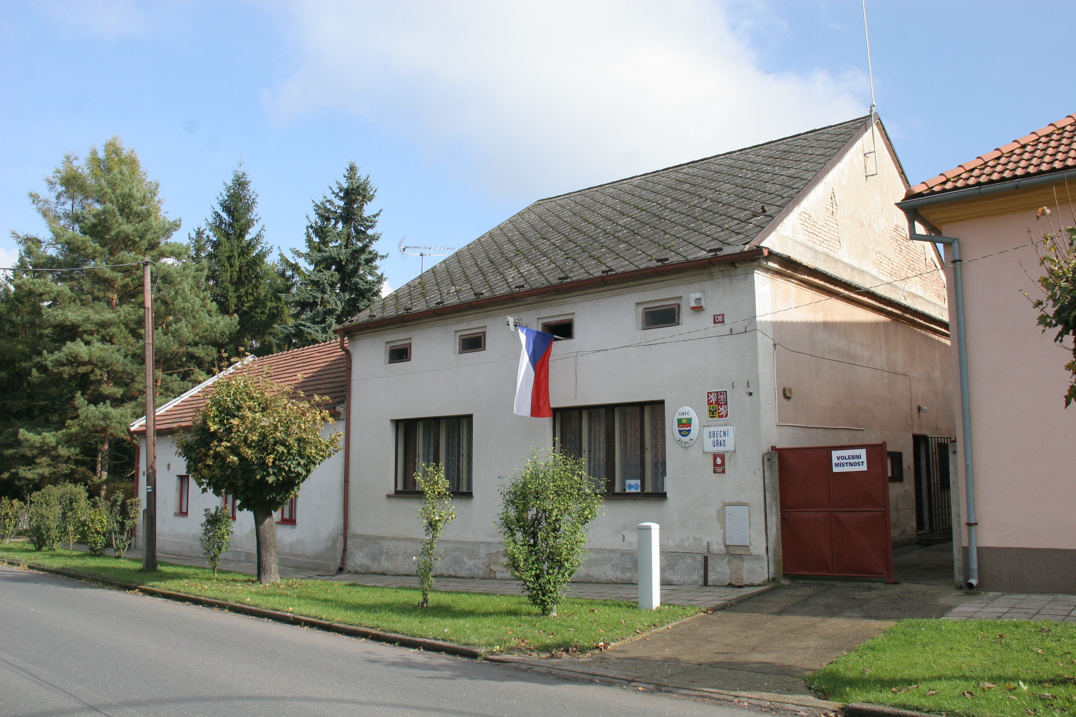 Žehuň obecní úřad